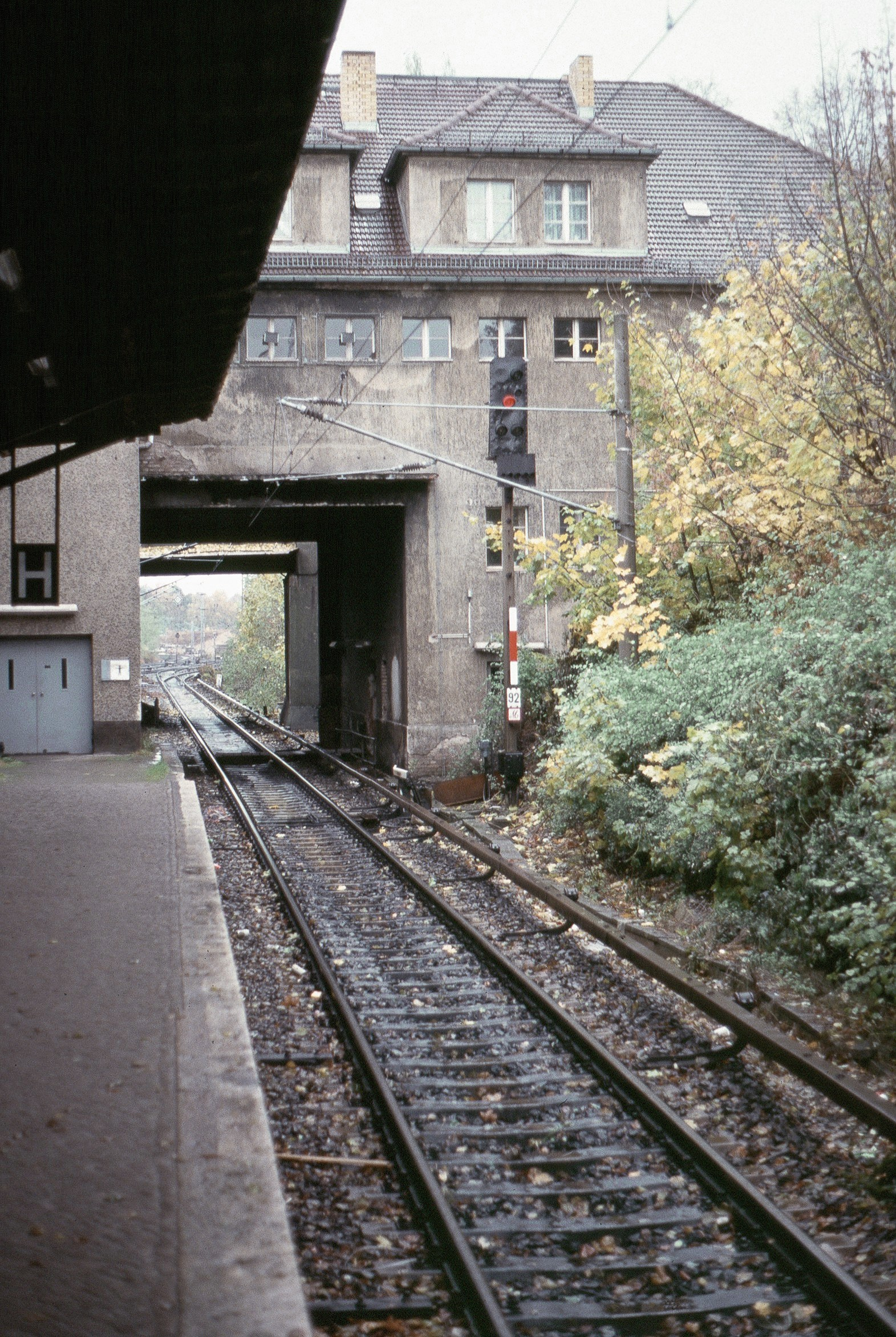 Birkenwerder: zwei Stromsysteme am selben Gleis